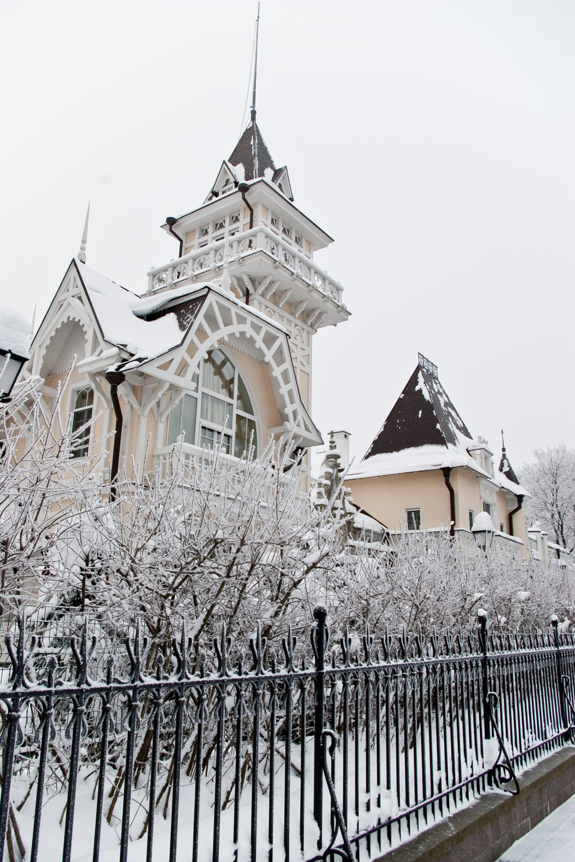 Усадьба Клейнмихеля